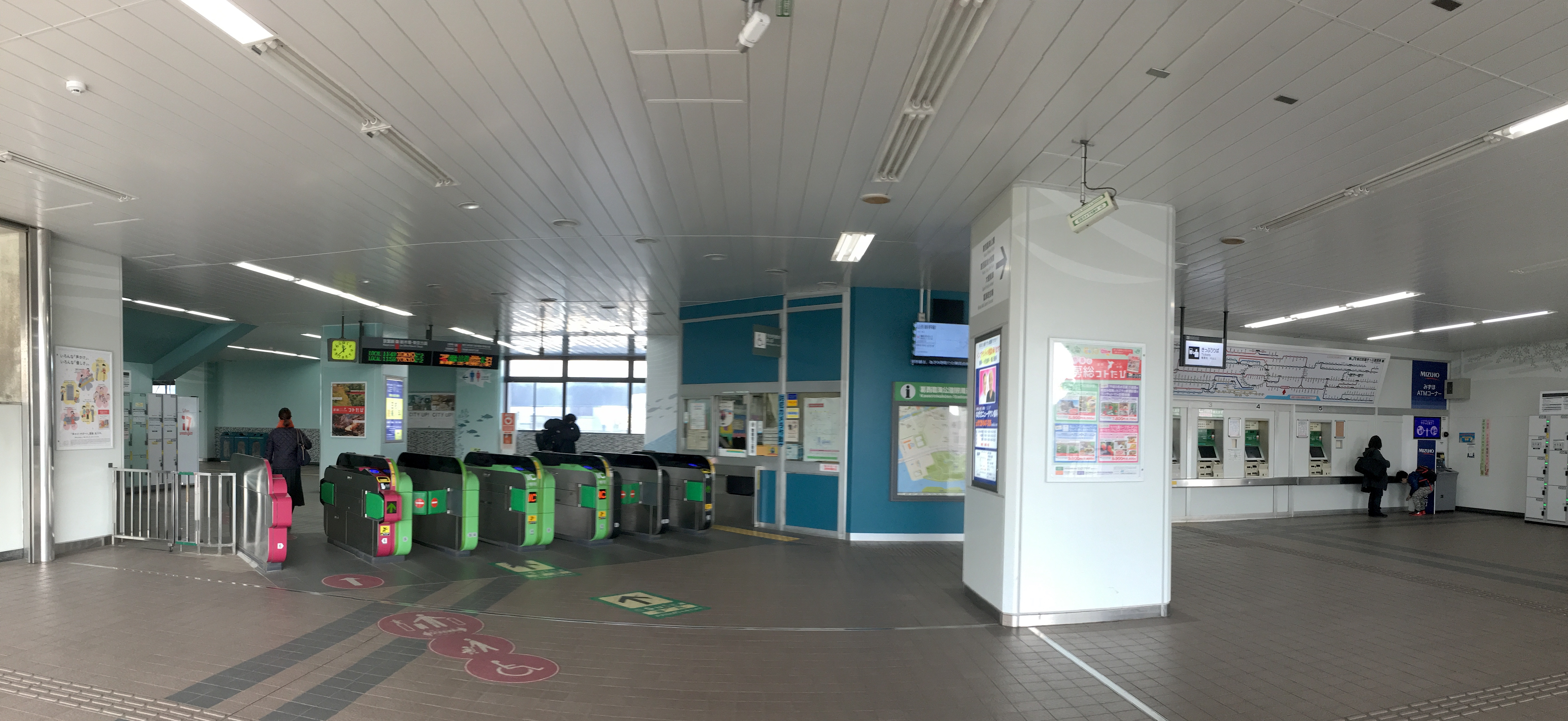 葛西臨海公園駅の改札 (Kasai-Rinkai Station ticket gates)